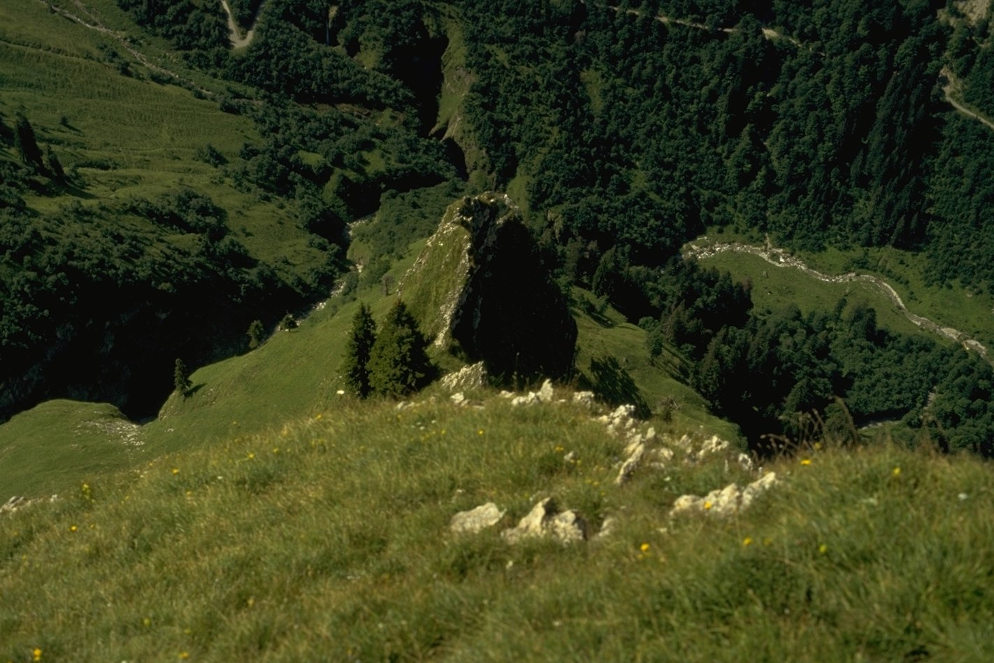 Blick vom Ausstieg des Rädlergrates auf den Rädlergrat